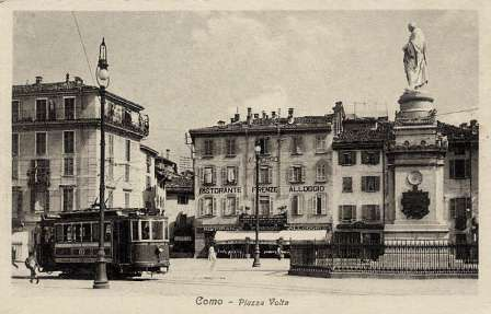 Como, piazza Volta con tram